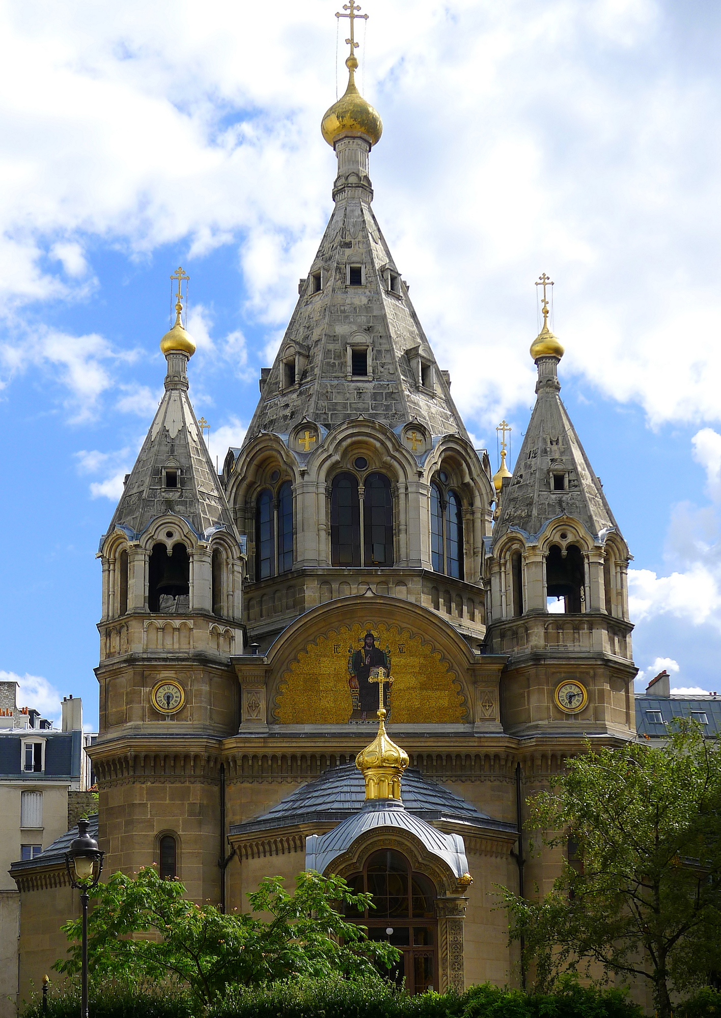 Cathédrale orthodoxe St-Alexandre-Nevski , rue Daru - Paris VIII